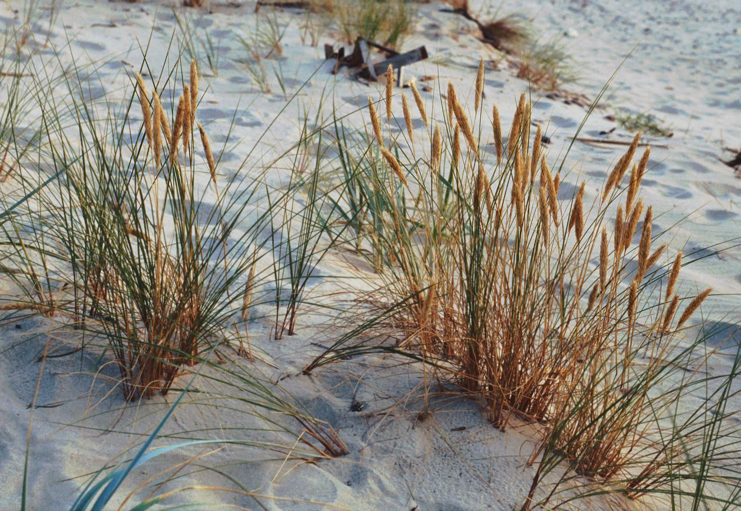 Strandhafer (Ammophila arenaria subsp. arenaria), Süßgräser (Poaceae) – Litauen/Lietuva/Lithuania: Kurische Nehrung/Kuršių nerija, N Nida